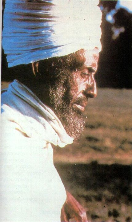 אורי בן ברוך - ברהן ברוך היה מחשובי מנהיגי ביתא ישראל במאה ה-20. כיהן כמנהיג רוחני חשוב של ביתא ישראל משנות הארבעים של המאה ה-20 ועד מותו, עסק בפעילות ציבורית רחבה למען עליית קהילתו לישראל.